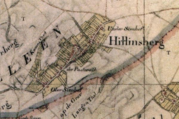 Kartenaufnahme der Rheinlande 1804/05